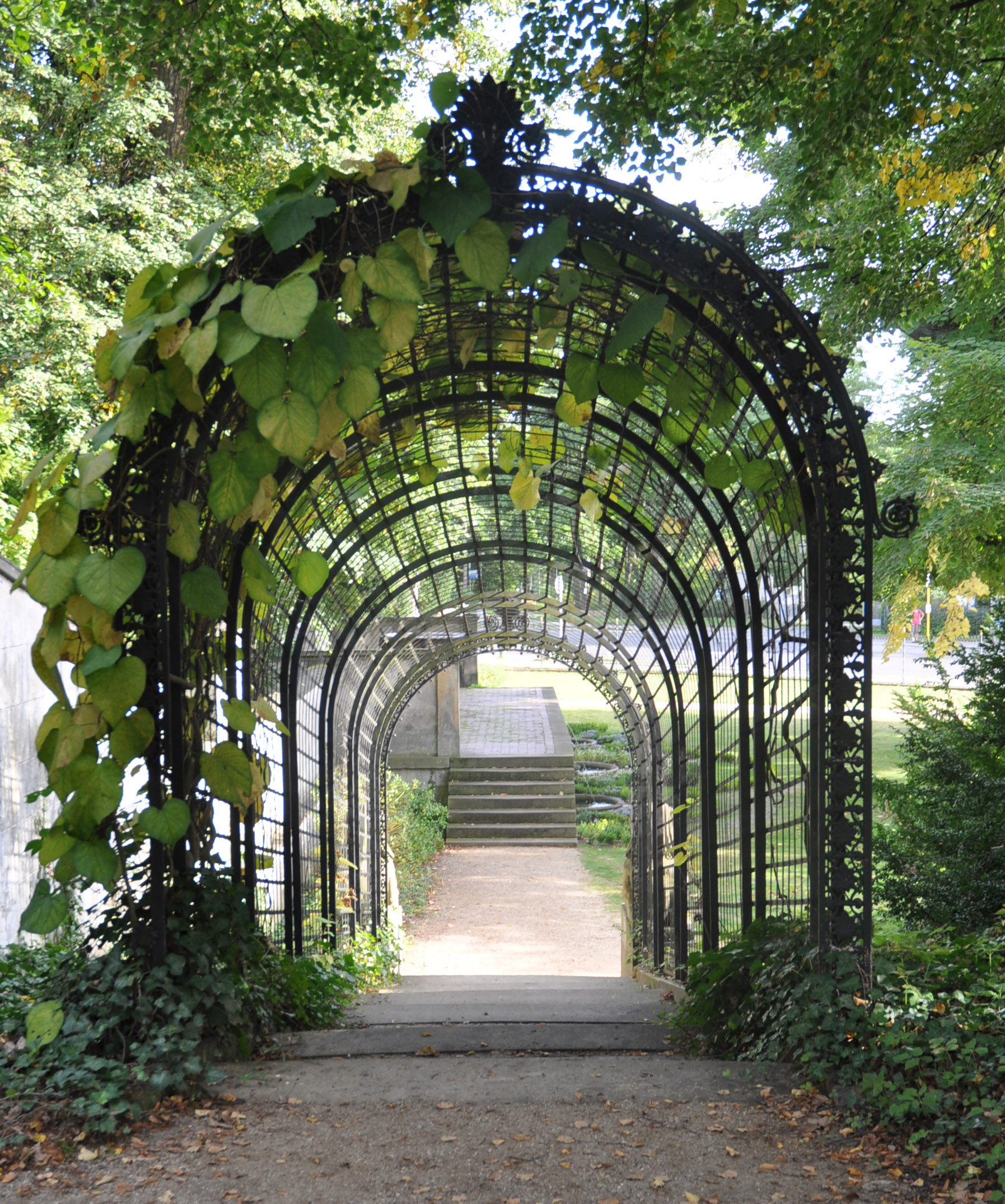 das berceau der Sphingentreppe zu Klein-Glienicke